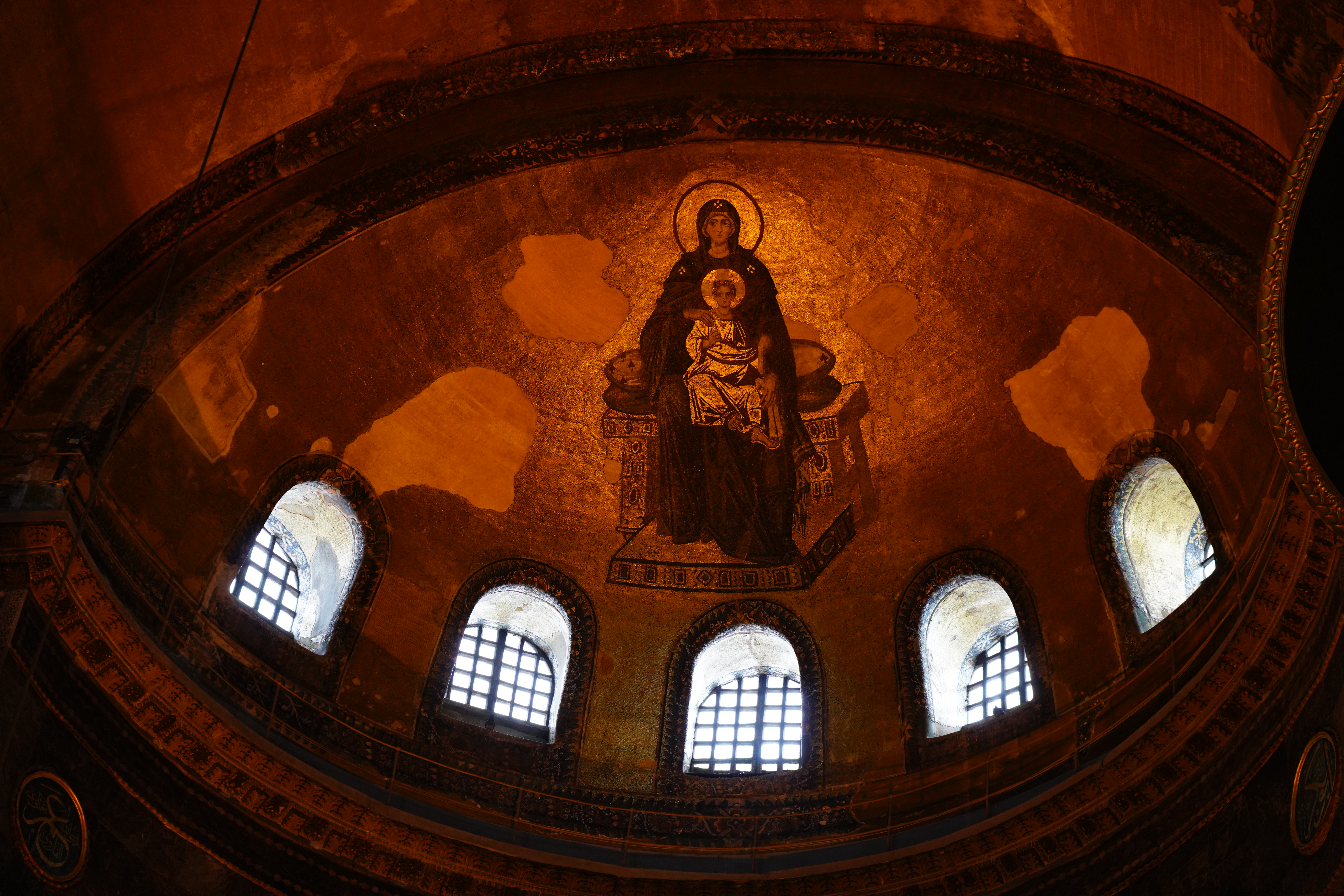 20180114_HagiaSophia_7628